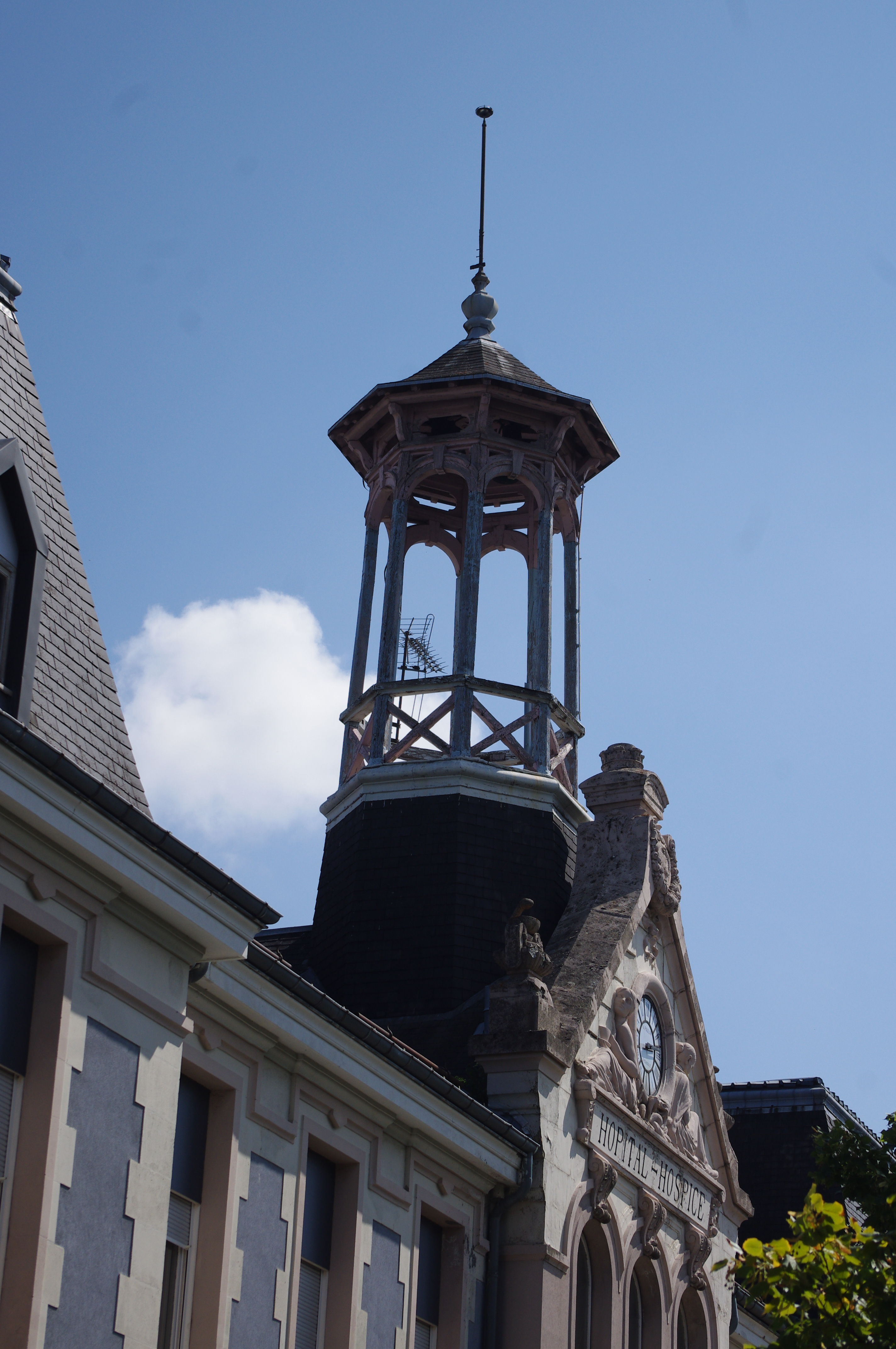 Clocheton et fronton de l'hôpital de La Mure (Isère)